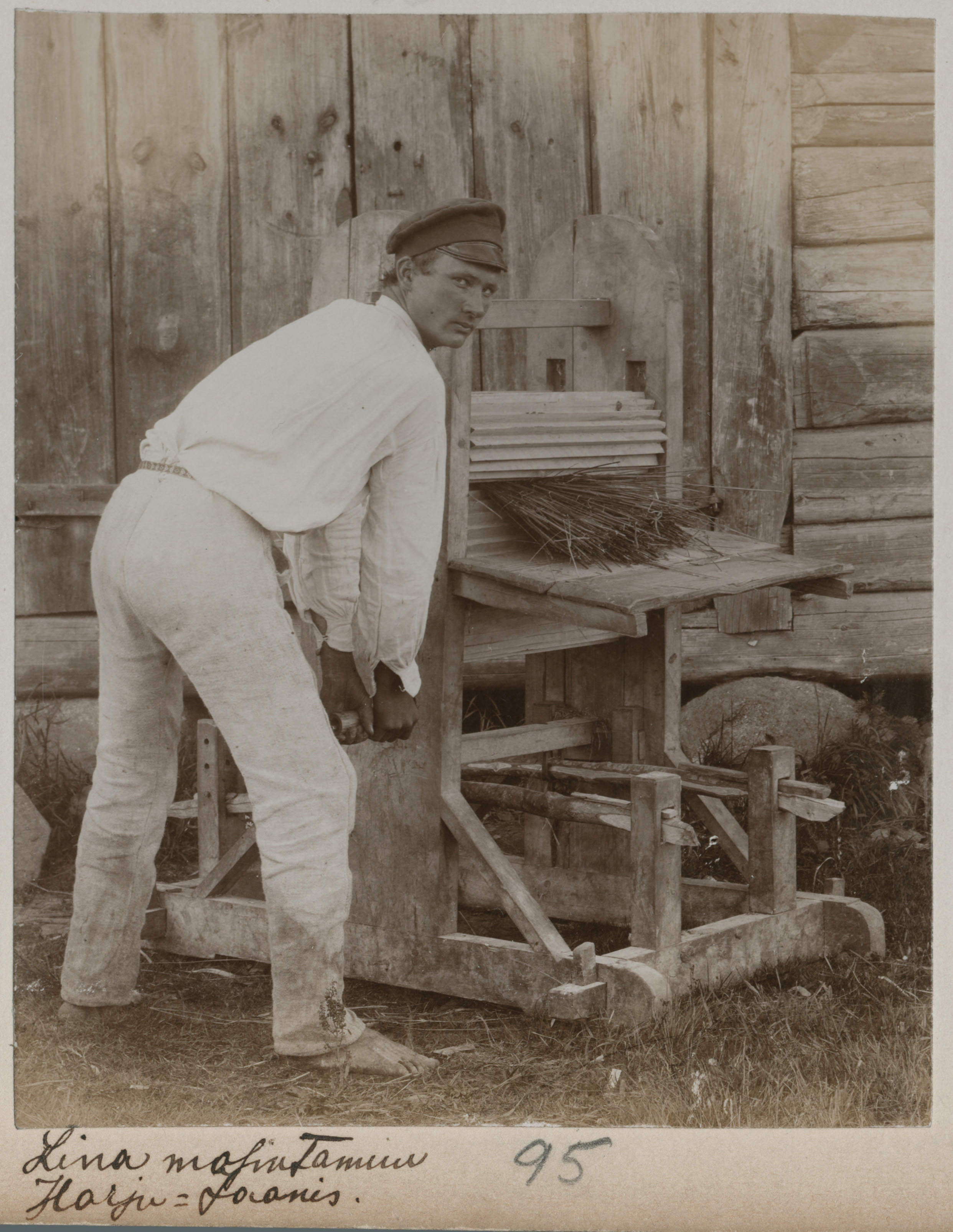 Lina masindamine Harju-Jaanis